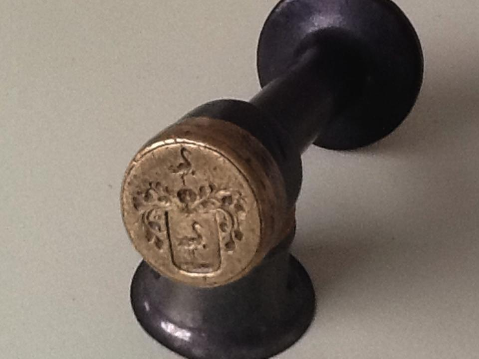 Petschaft der Familie Lüdke, seit etwa 1730 im Gebrauch der Familie